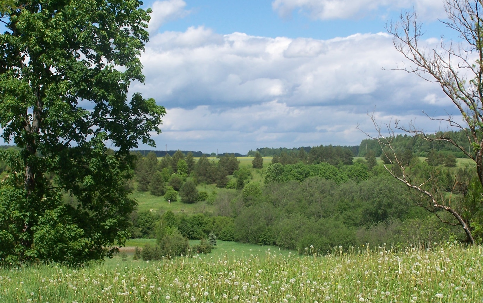 Sverbų pilkapio apylinkės